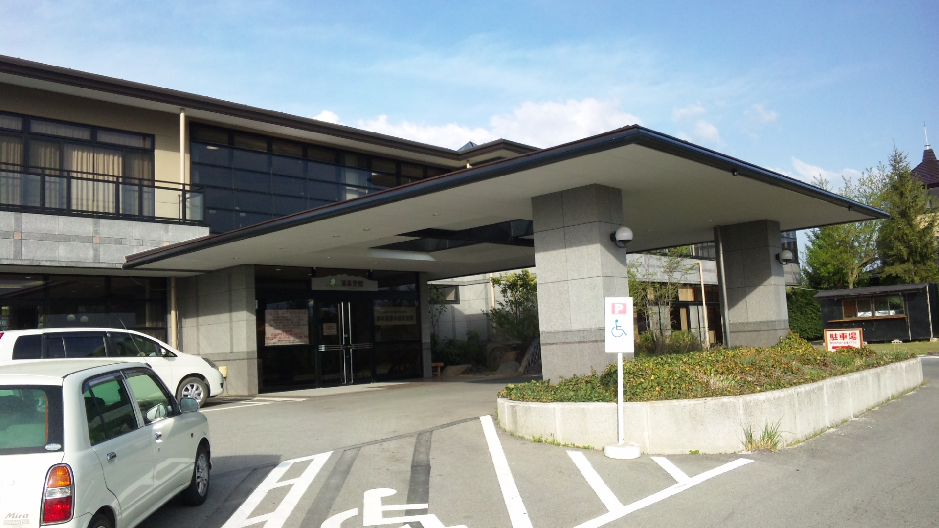 自分で撮影